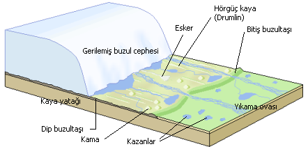 Kaynak: Image:Receding glacier landscape LMB (no text).png dan alınarak Türkçeleştirildi.